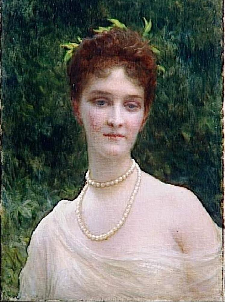 Agnès de Pourtalès, marquise de Loys-Chandieu